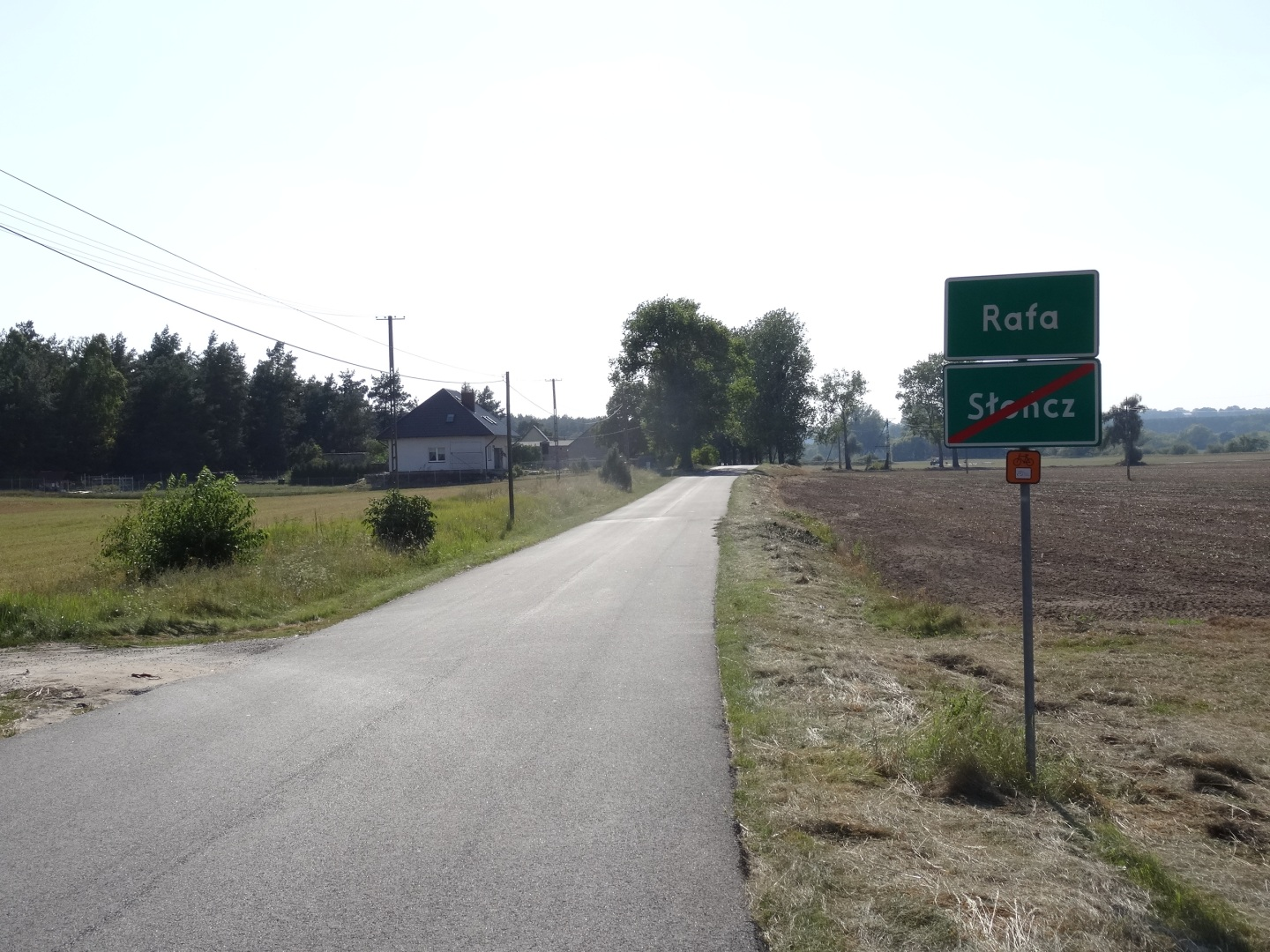 Słończ, gmina Dąbrowa Chełmińska